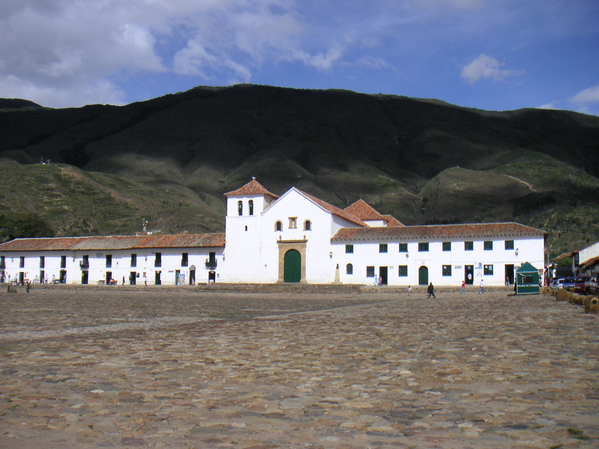 Description: Plaza Central, Villa de Leyva, Colombia Source: Louise Wolff (darina), June 2005